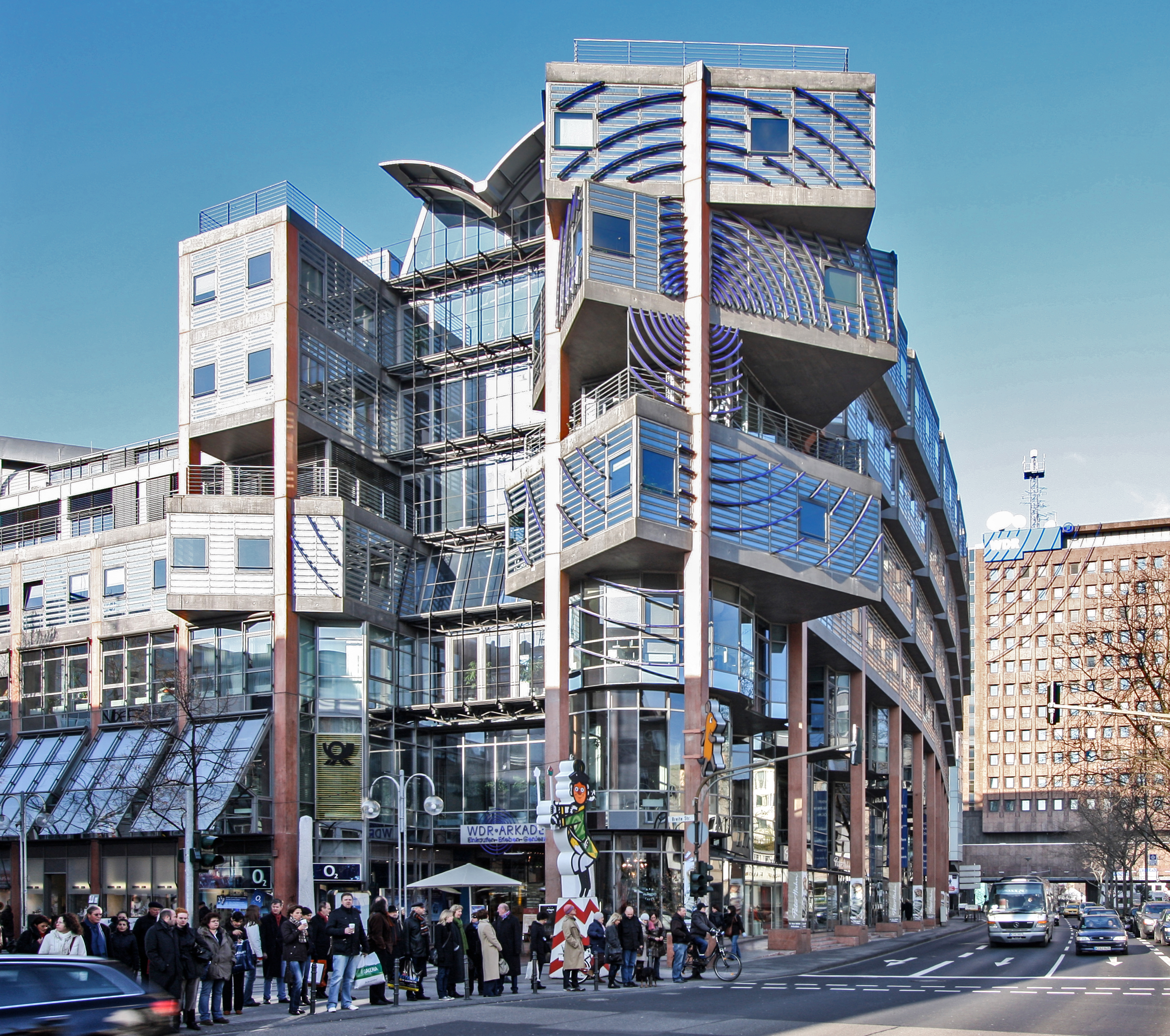 WDR-Arkaden Köln, Architekt: Gottfried Böhm